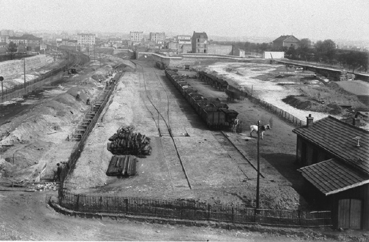 Gare de Charonne-Marchandises sur la Petite Ceinture